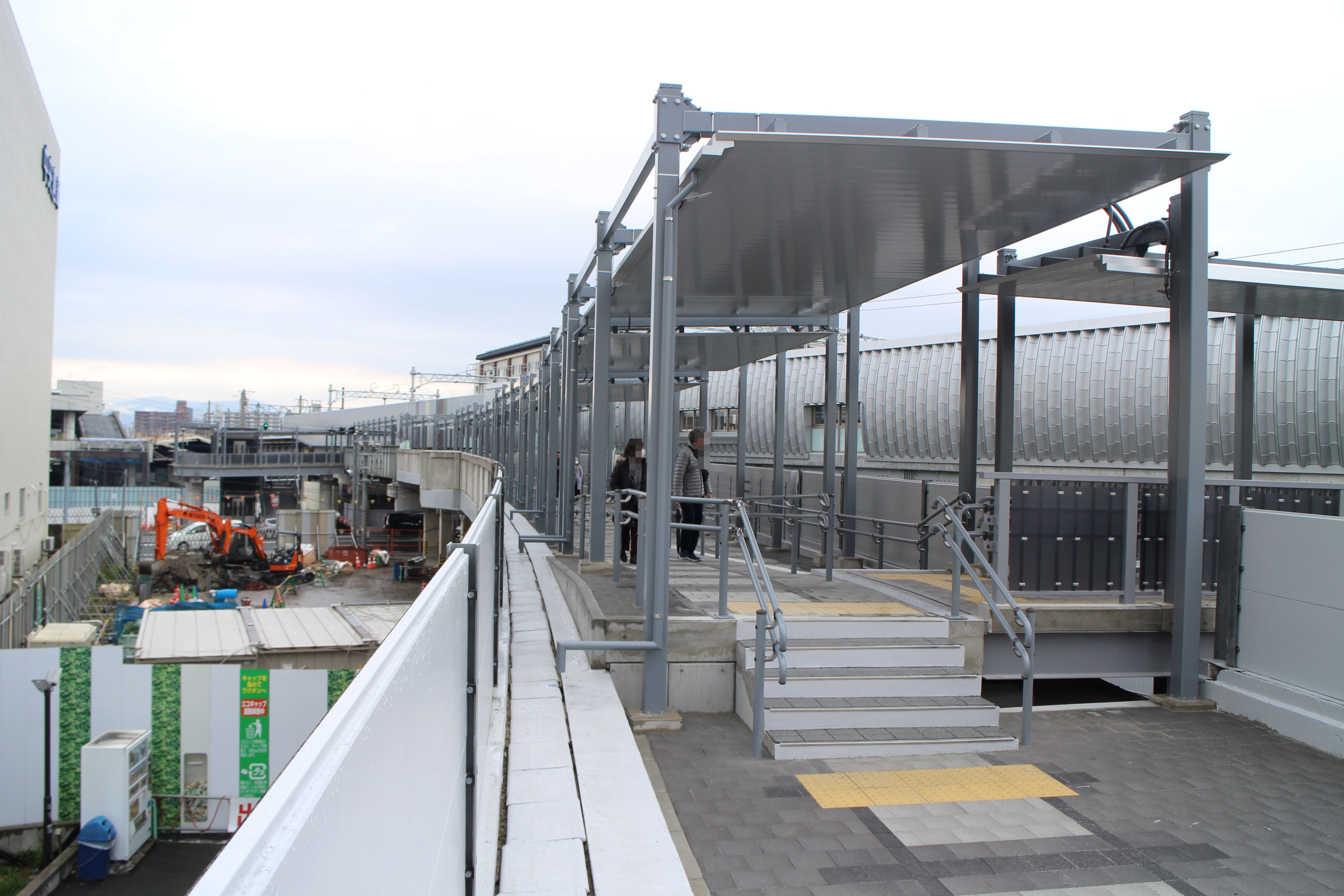 梅小路京都西駅/横断歩道橋